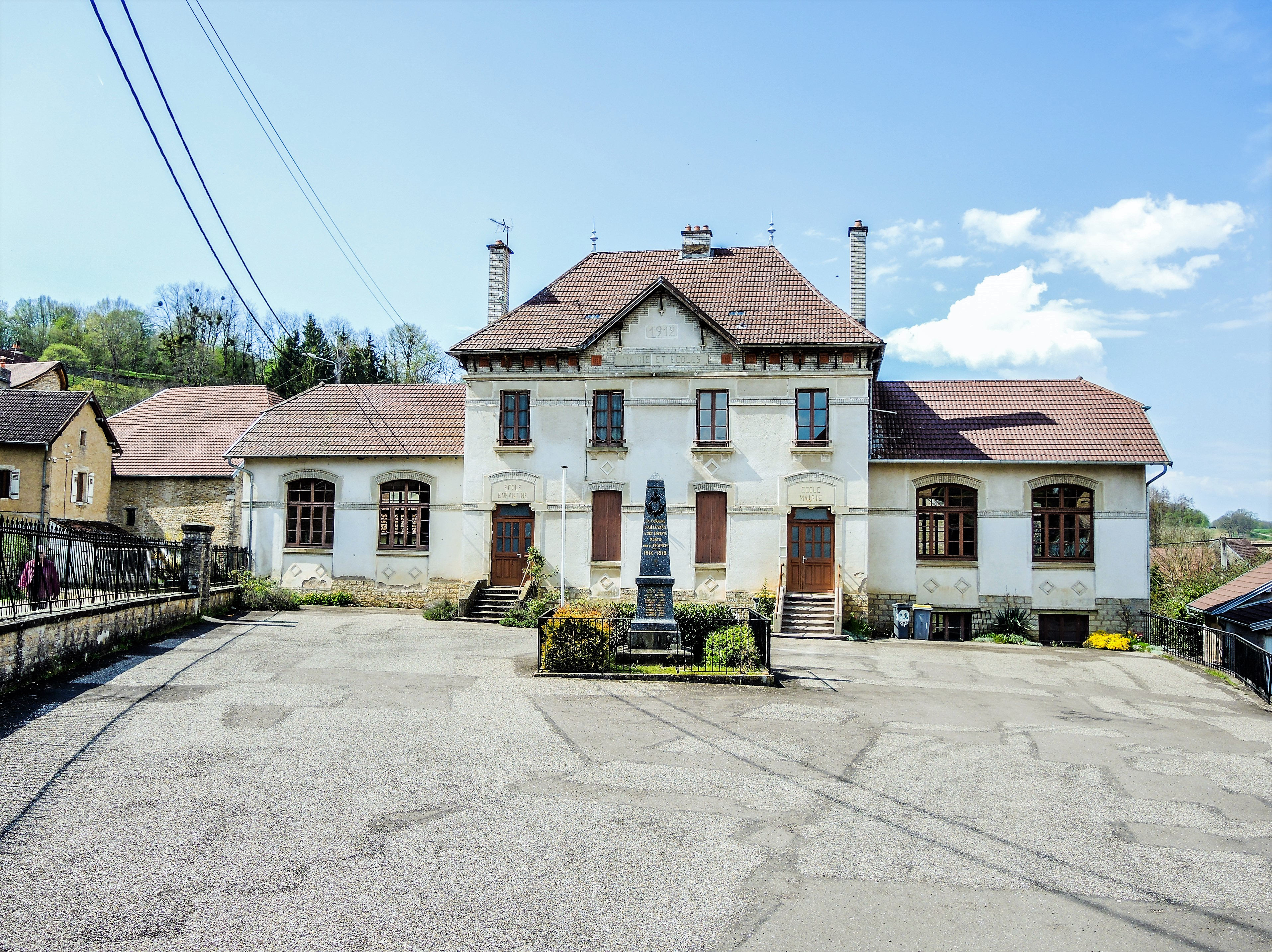 Mairie-école